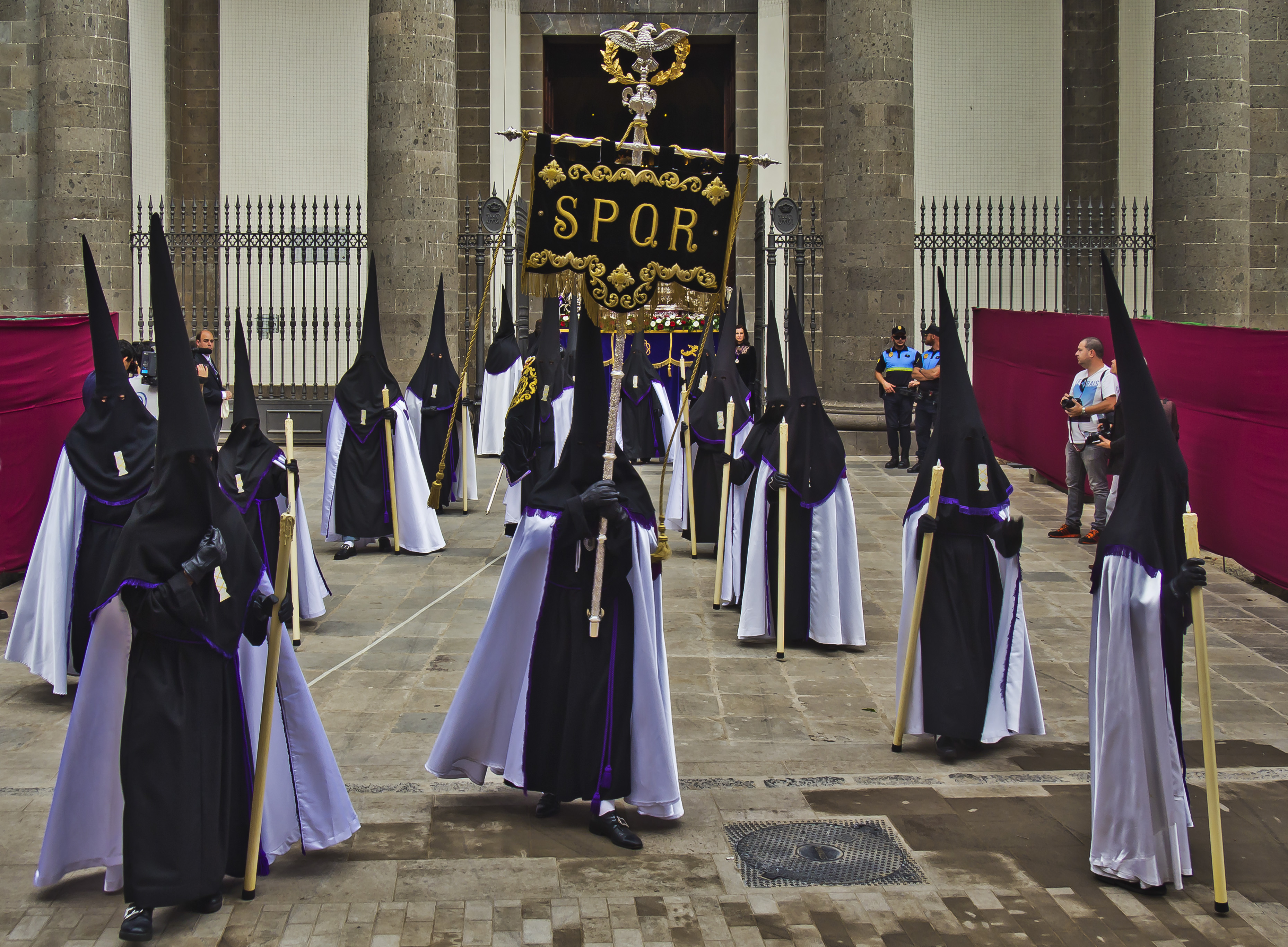 Real, Muy Ilustre y Capitular Cofradía de la Flagelación de Nuestro Señor Jesucristo